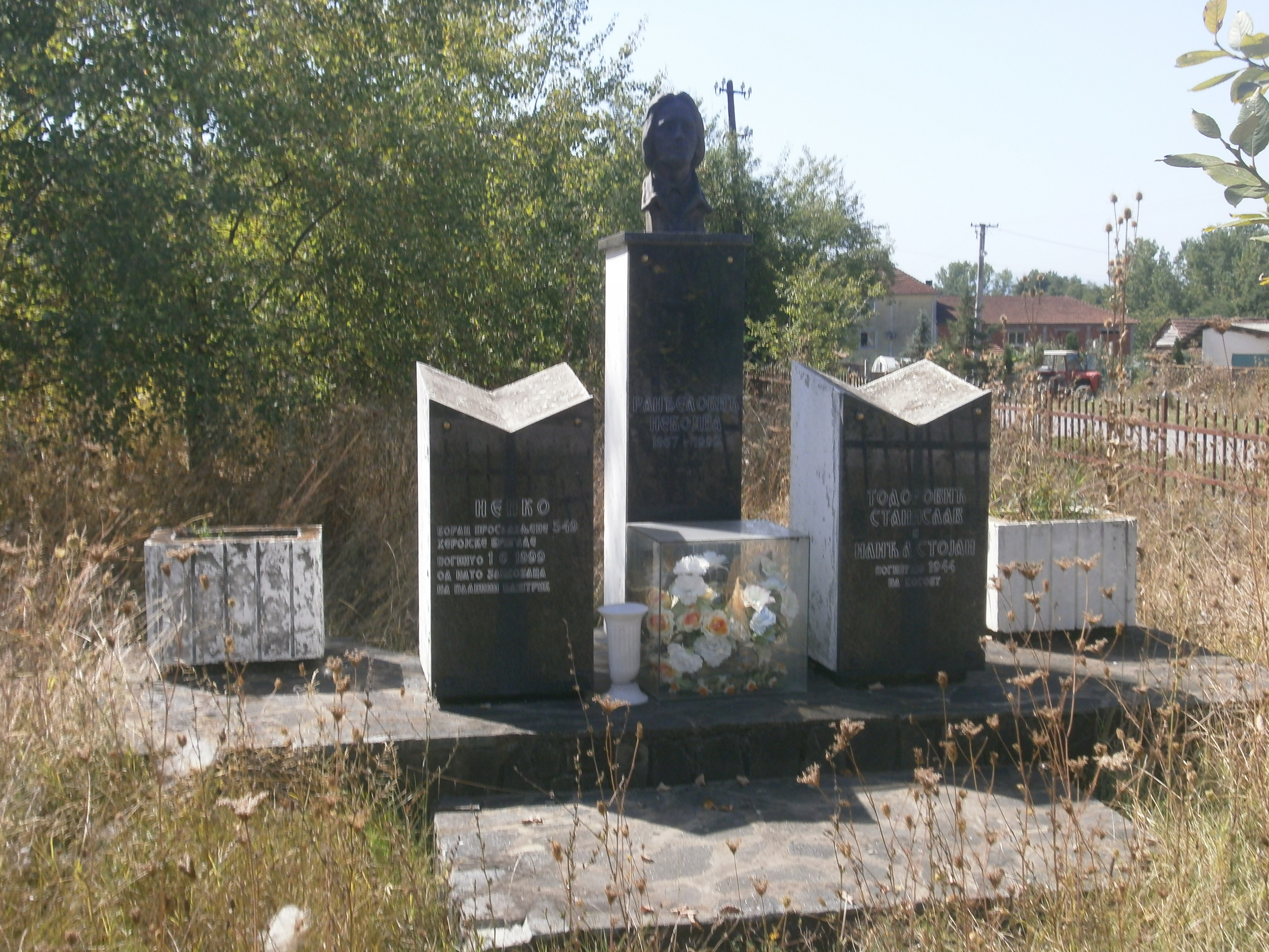 Srpski (latinica): Beli Potok, Leskovac